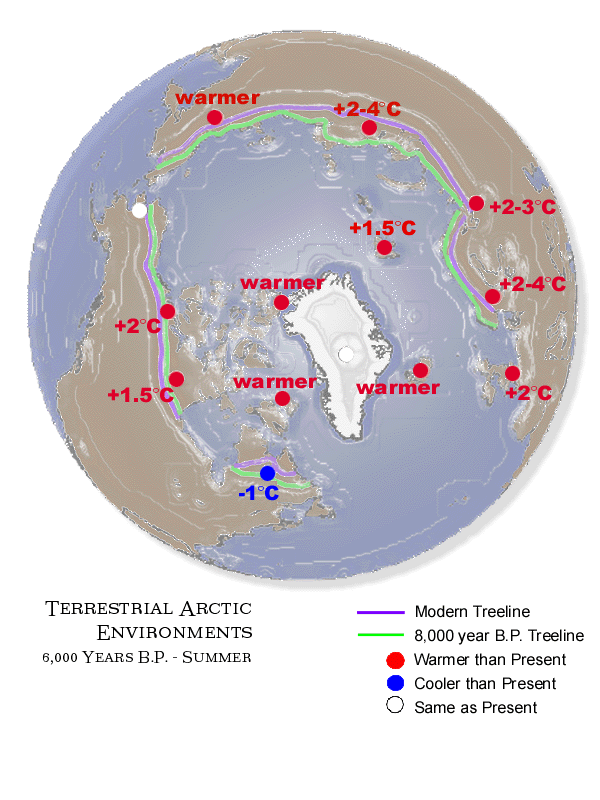 Eine Darstellung des Atlantikums, dem Holozänen Klimaoptimum vor etwa 8000 Jahren vor Heute.